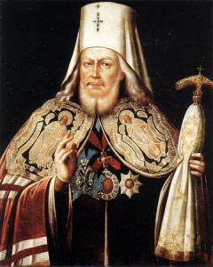 Митрополит Платон (Левшин)